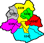 Les 19 communes de Bruxelles regroupées en 6 zones de police avec leur Code respectif.